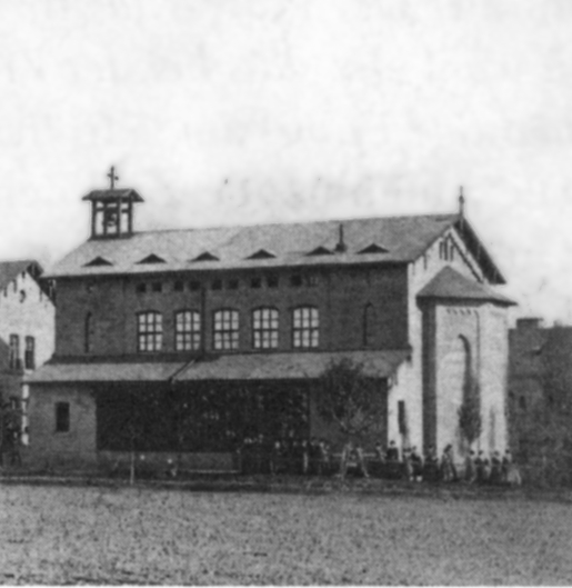 Betsaal (1859 erbaut), die heutige Paramentik